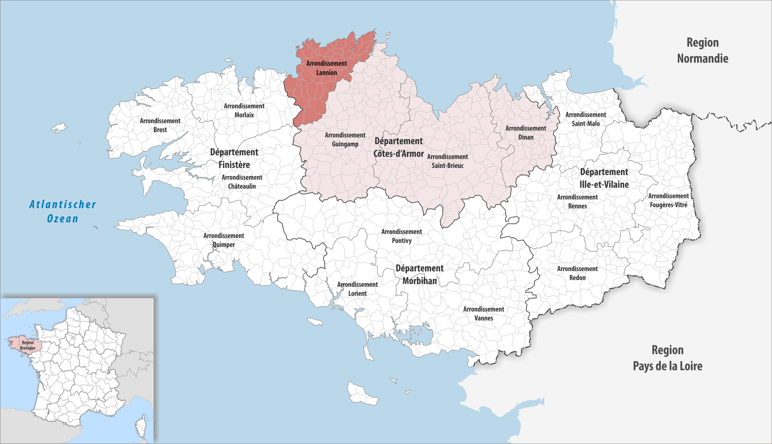 Lage des Arrondissements Lannion